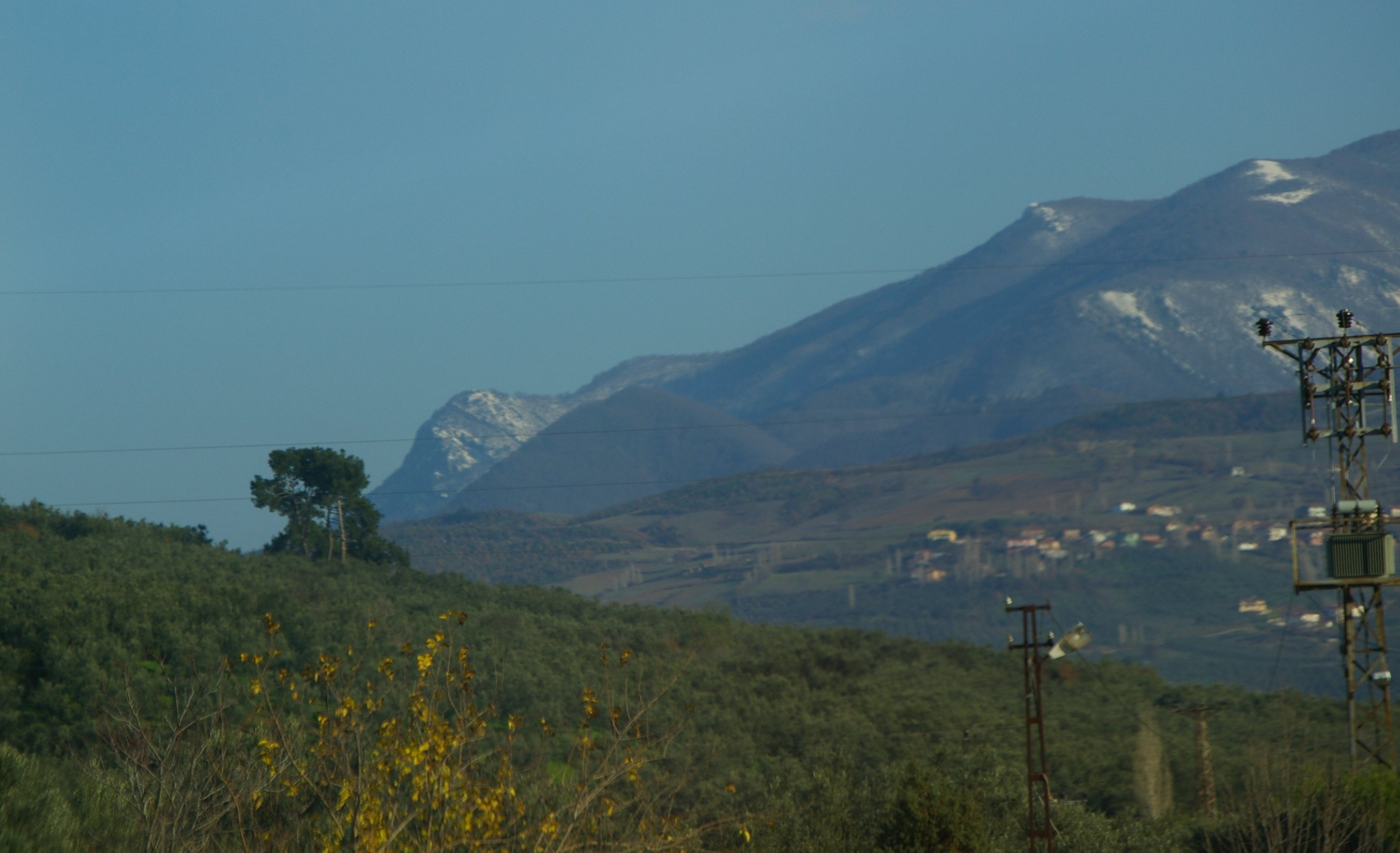 Gürle Dağı